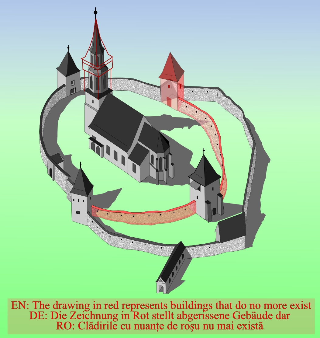 Macheta pentru Biserica fortificată din Alţâna.